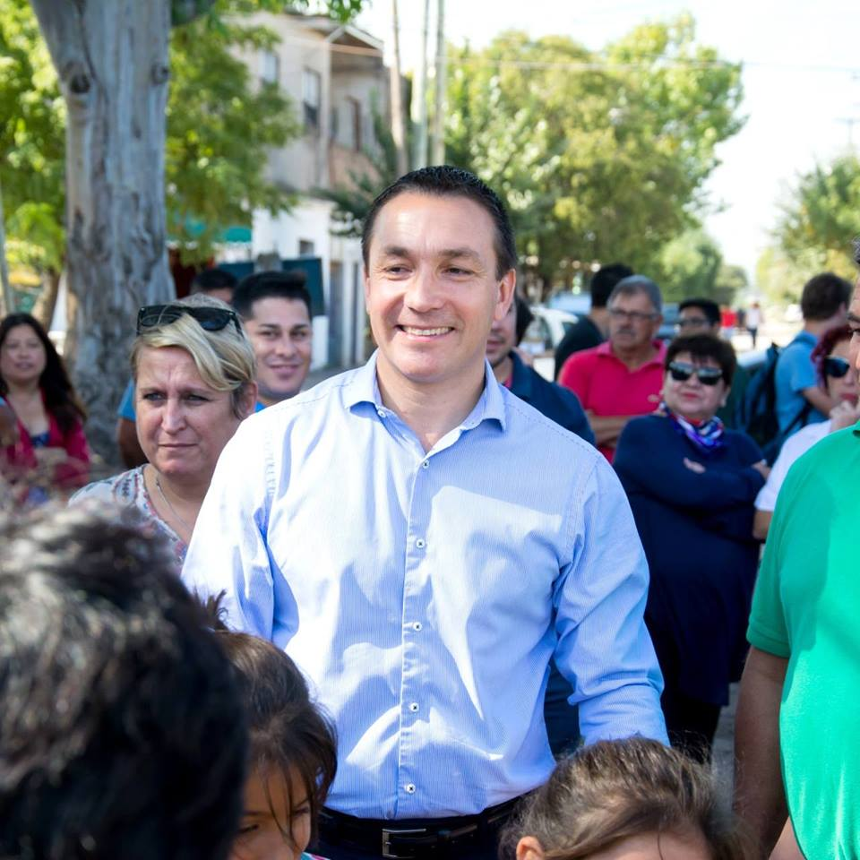 Andrés Watson, Intendente de Florencio Varela.